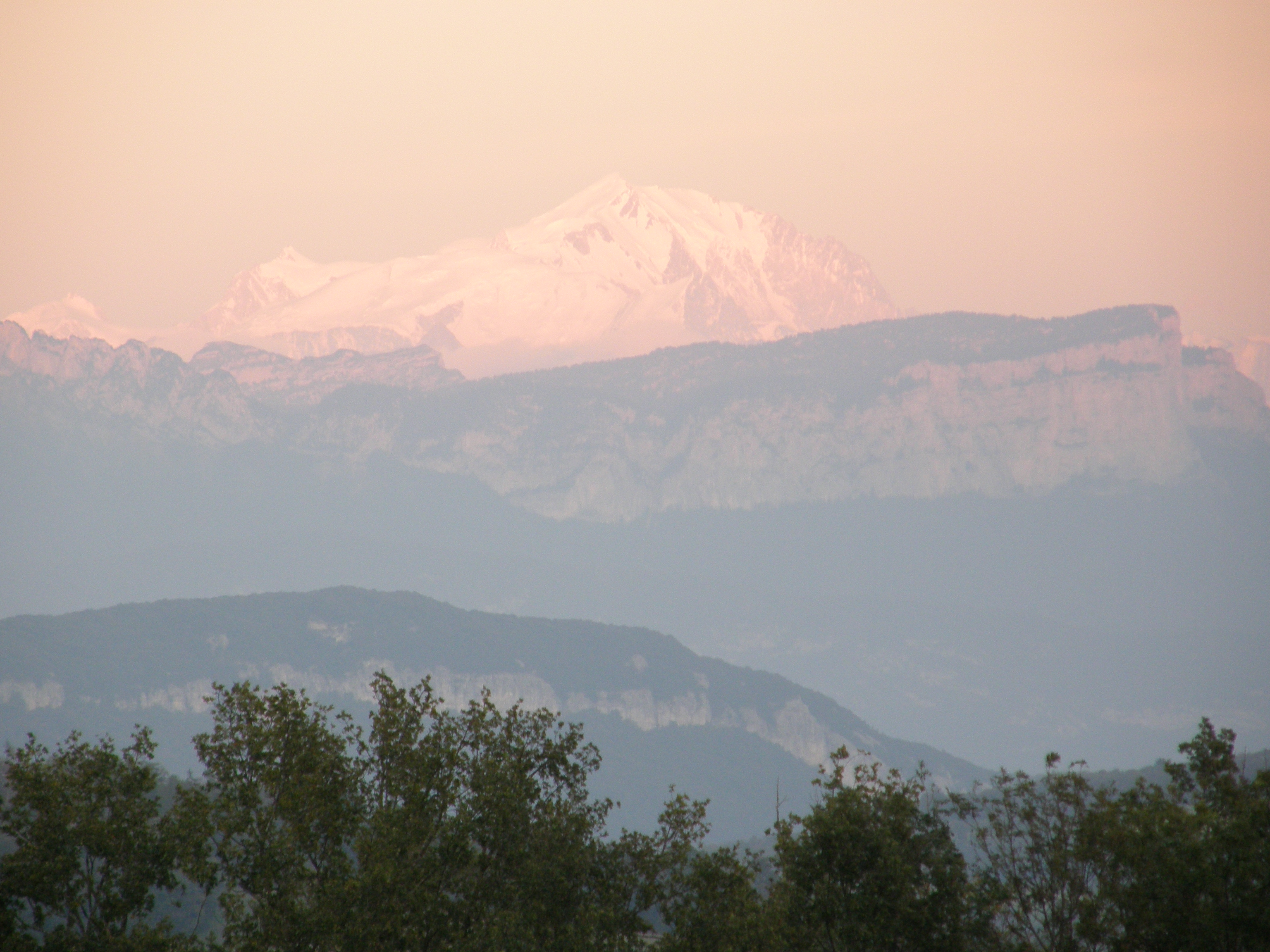 vue du Mont Blanc depuis le village de Clermont en genevois